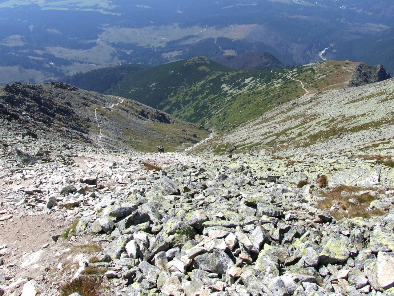 Wielki Żleb Krywański (Veľký žľab), Wyżnia Przechyba, Kopa Krywańska i Gronik